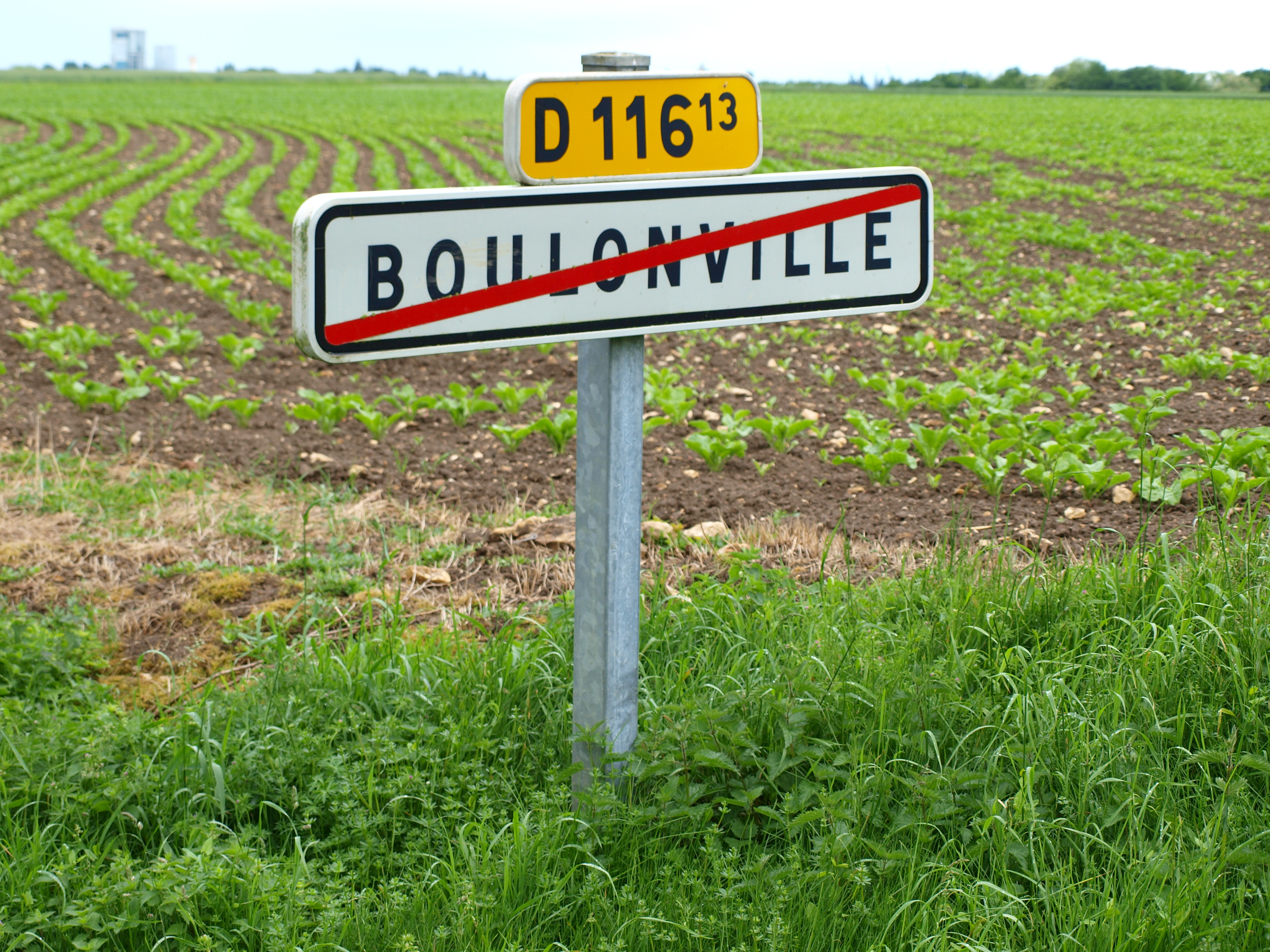 Sainville (Eure-et-Loir, France) ; hameau de Boulonville